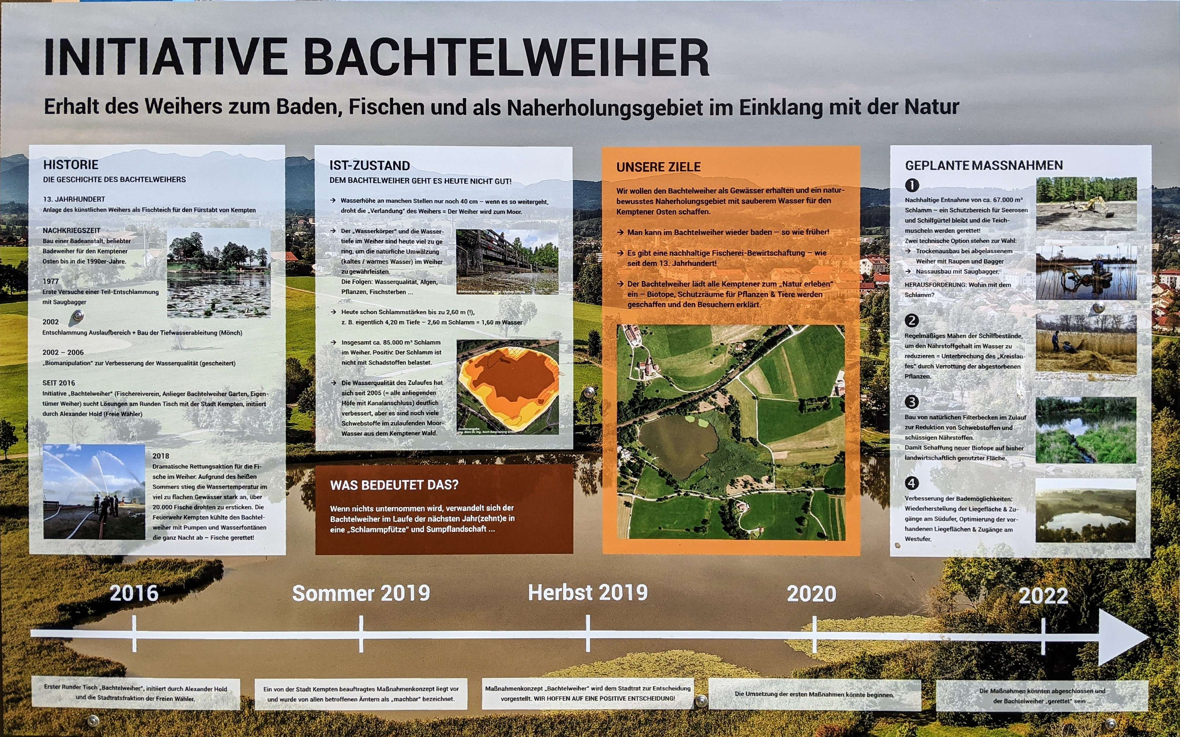 Die öffentliche Informationstafel der "Initiative Bachtelweiher" wirbt für den Erhalt des Weihers zum Baden, Fischen und als Naherholungsgebiet im Einklang mit der Natur.